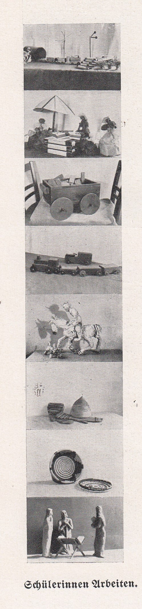 Schülerarbeiten Friedrich-Fröbel-Haus Berlin-Niederschönhausen